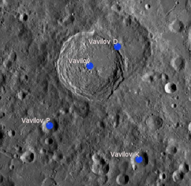 Cráter lunar Vavilov. Cráteres satélite. (Imagen LRO)